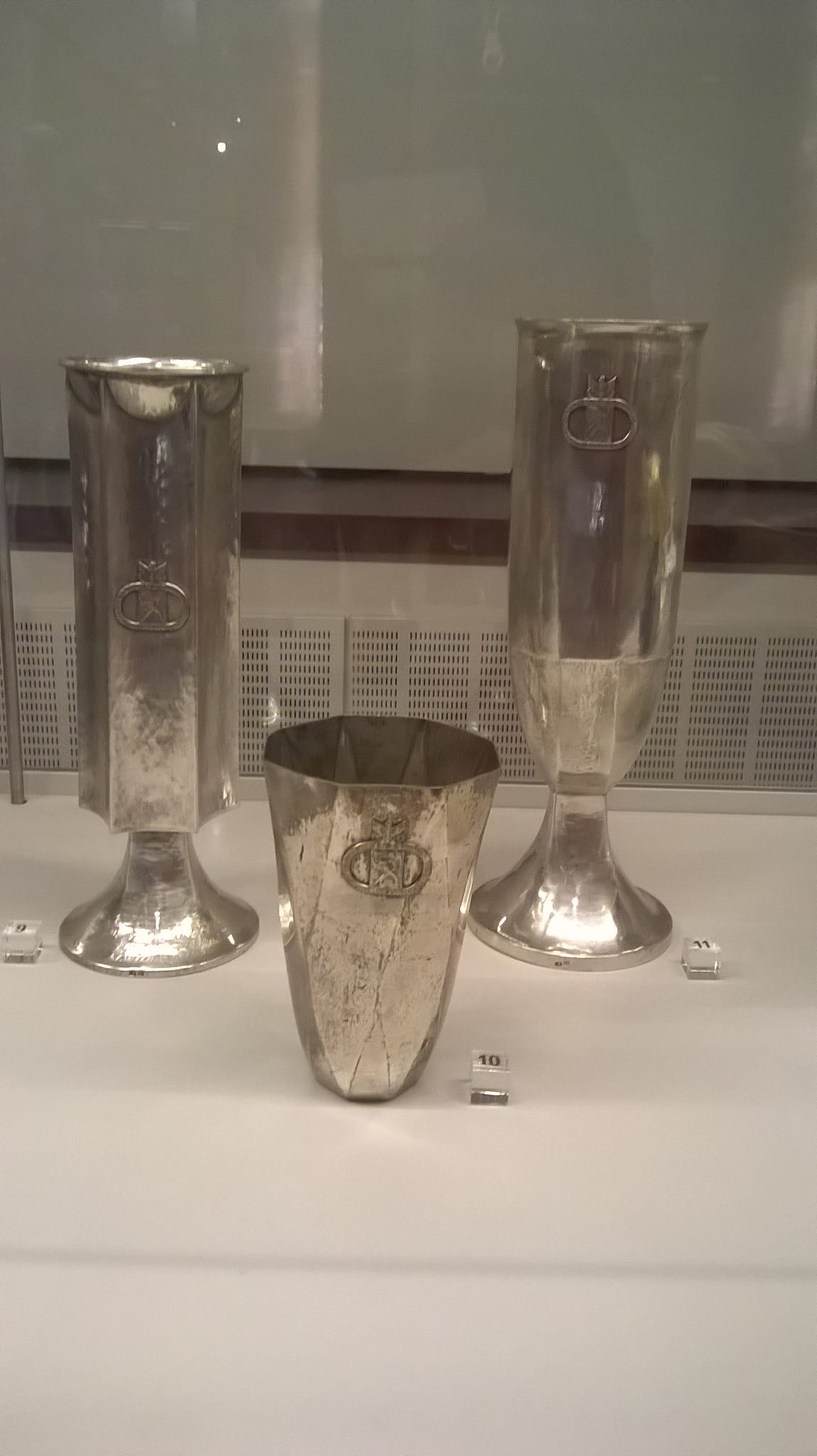 Puchary stanowiące nagrody na Mistrzostwach Świata w Strzelectwie 1931, autorstwa Zygmunta Buczyńskiego. Ze zbiorów Muzeum Sztuk Użytkowych w Poznaniu